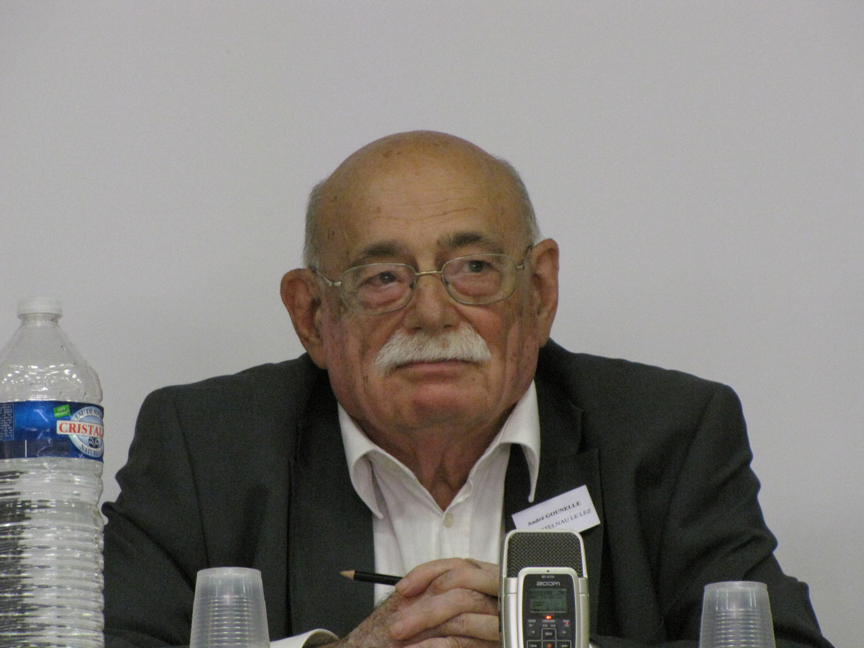 Table ronde avec Soheib Bencheikh à La-Grande-Motte (Montpellier) sur le thème de "Jésus au-delà des évangiles", organisée par Evangile et Liberté